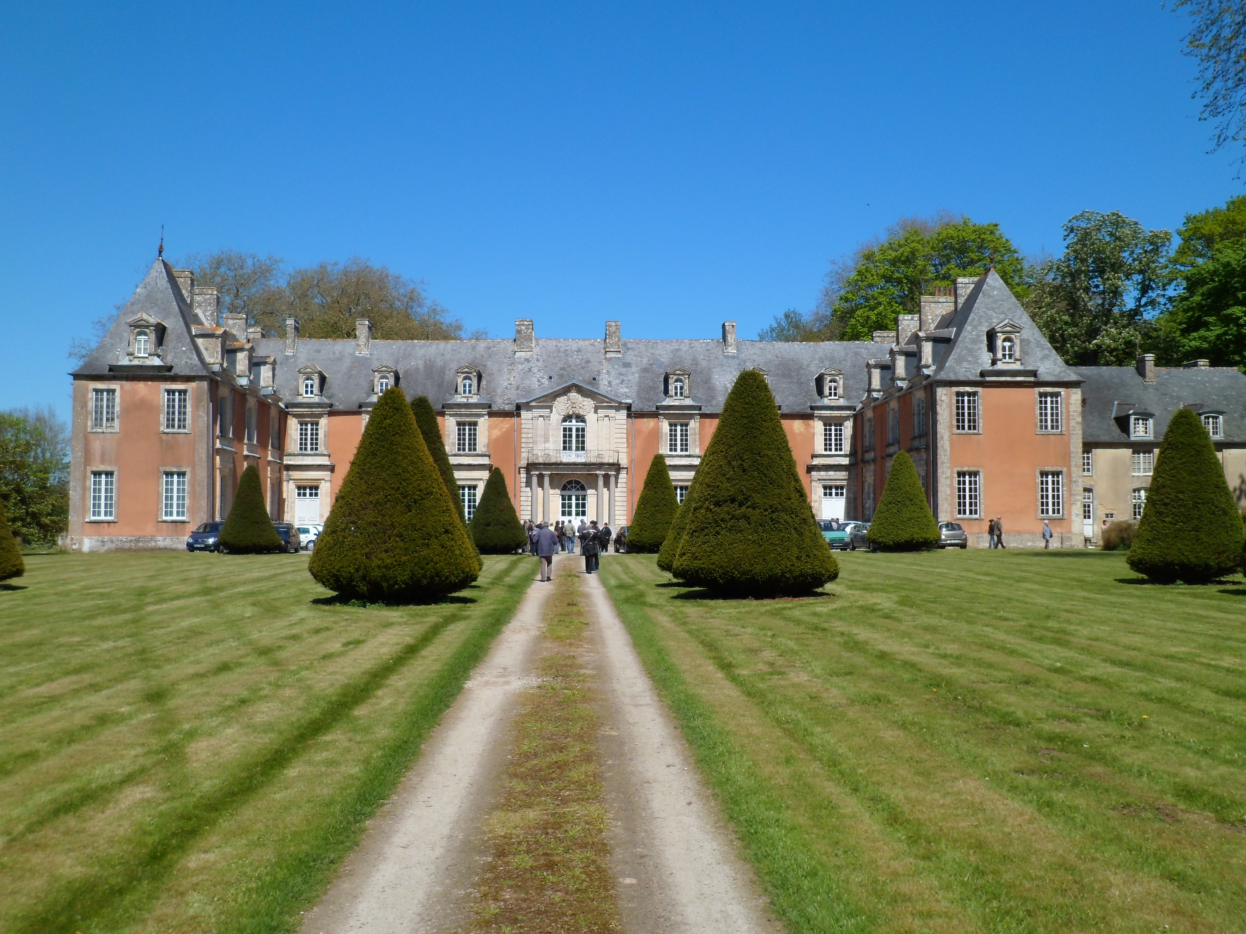 Château de Franquetot, Coigny .